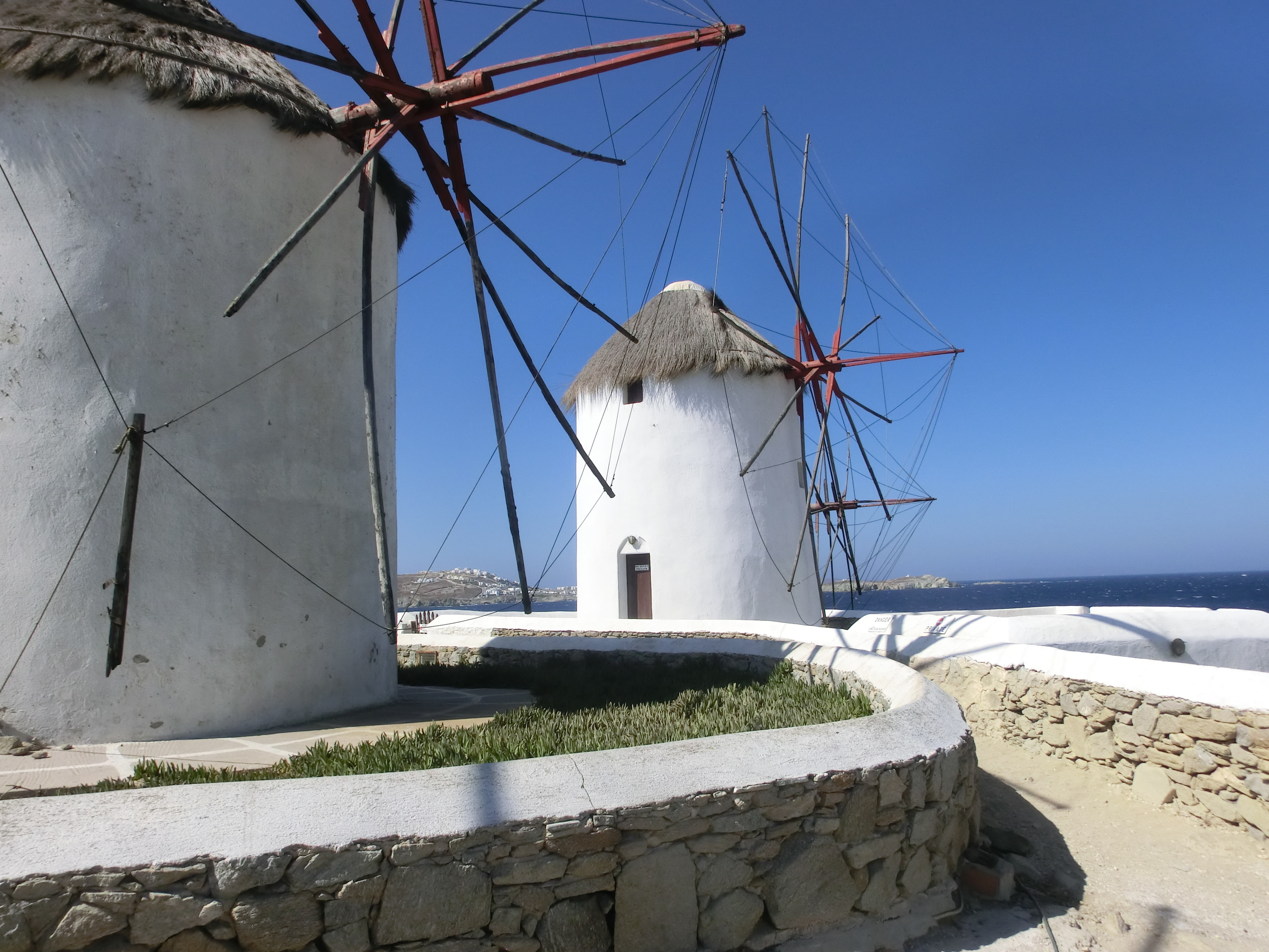 Les moulins de Mykonos.